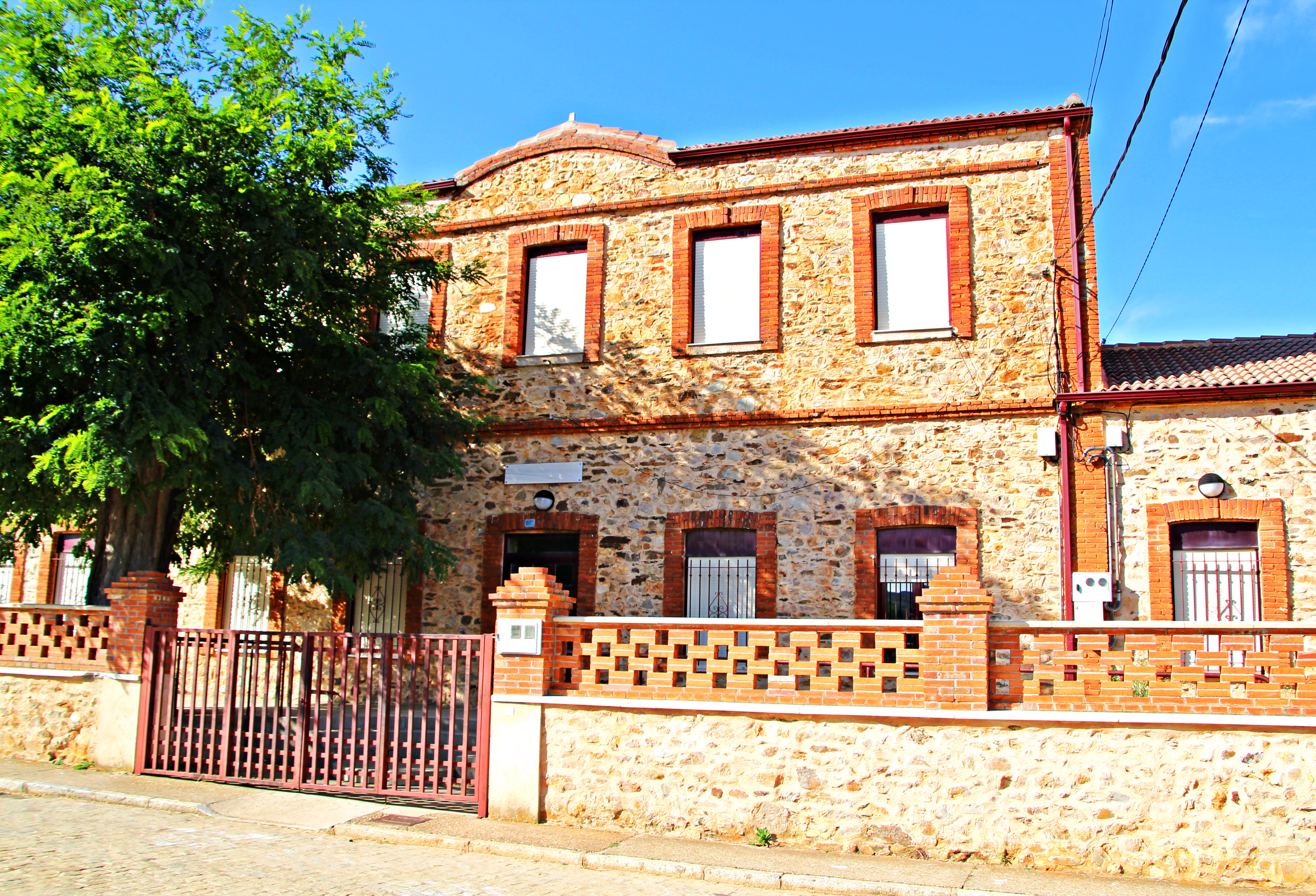 Tabuyo del Monte, La Maragatería, provincia de León.